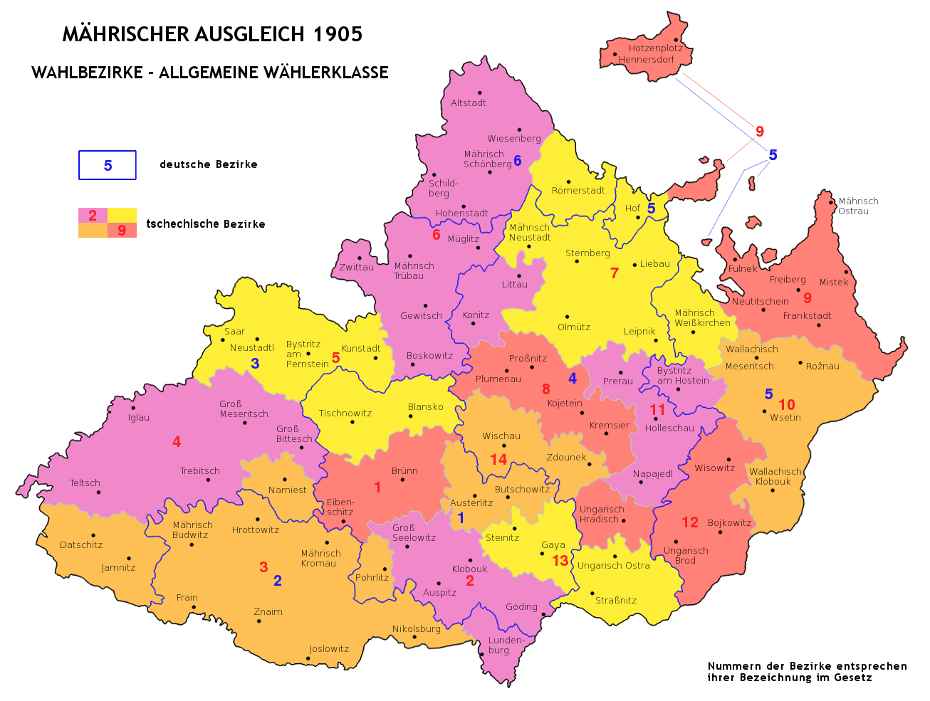 Tchechische und deutsche Wahlbezirke in der allgemeinen Wählerklasse nach dem mährischen Landesgesetz aus 27.11.1905